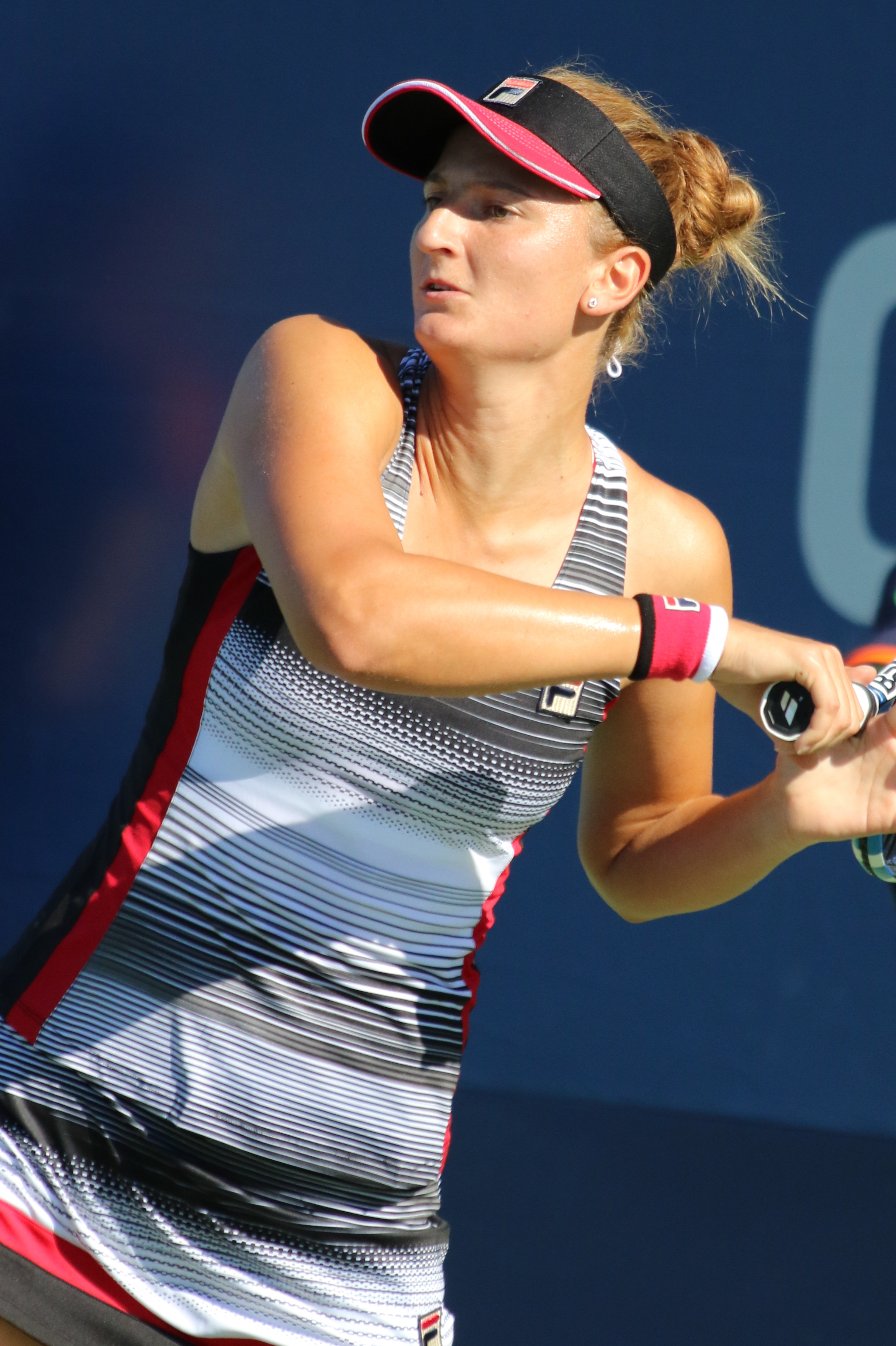 Begu US16 (14)